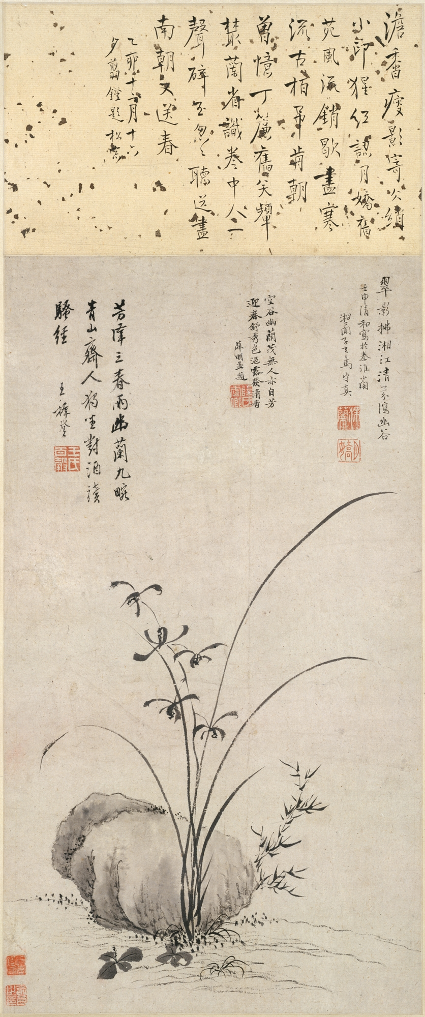 China; Hanging scroll; Paintings